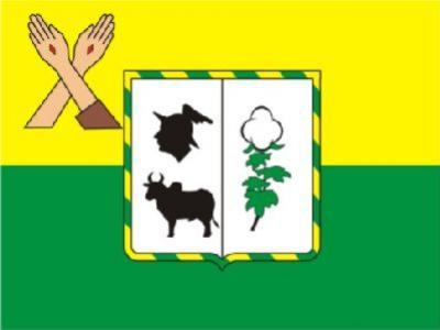 Bandeira Municipal de Canindé, Estado do Ceará